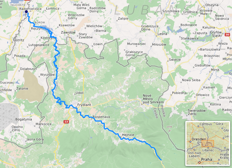 carte réalisée sur umap [1] This map may be incomplete, and may contain errors. Don't rely solely on it for navigation.